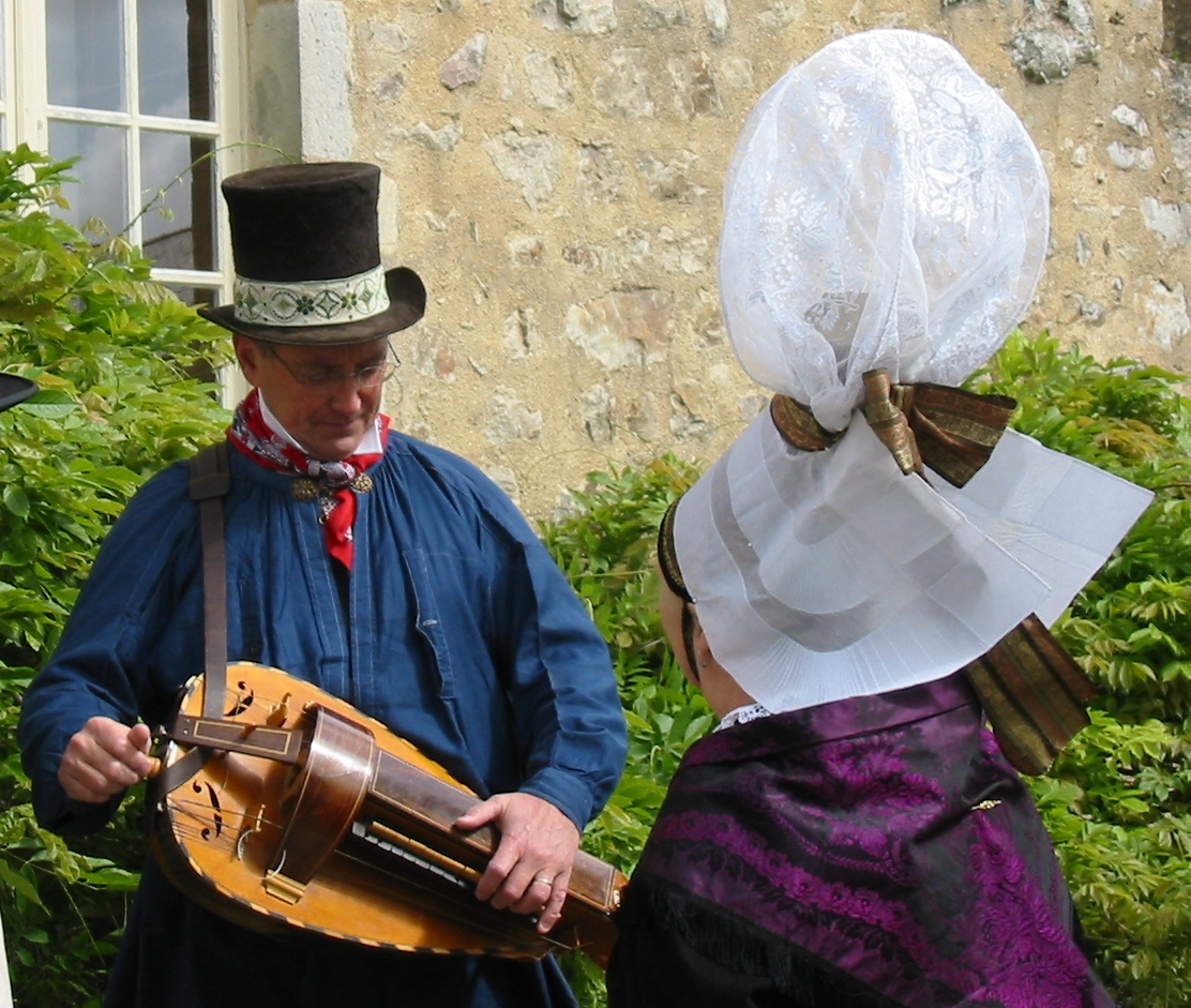 Fête Normande (Fête des Rouaisouns), Bricquebec, Mai 2007